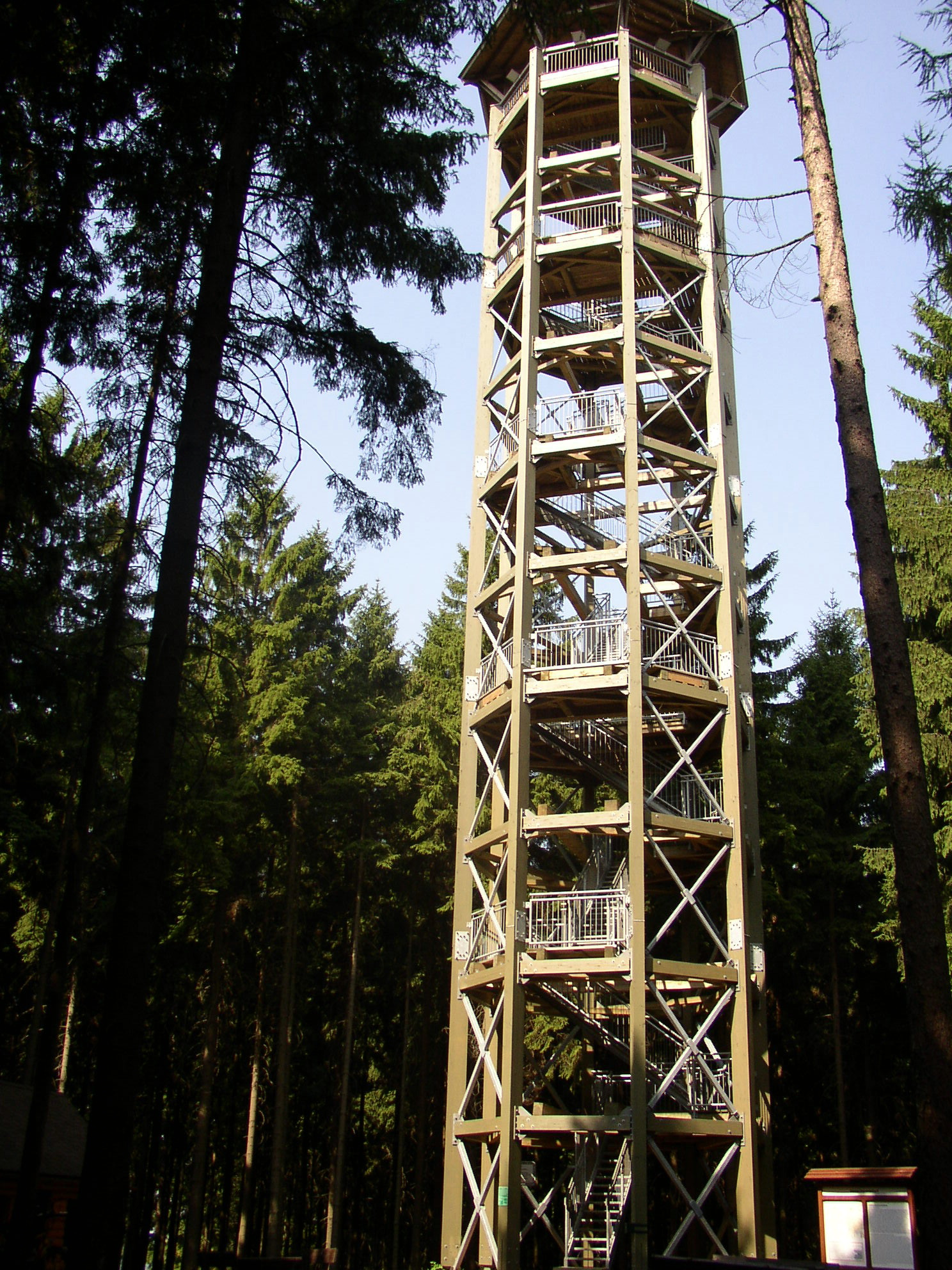 Aussichtsturm auf Weifberg bei Hinterhermsdorf, Saxony, Germany